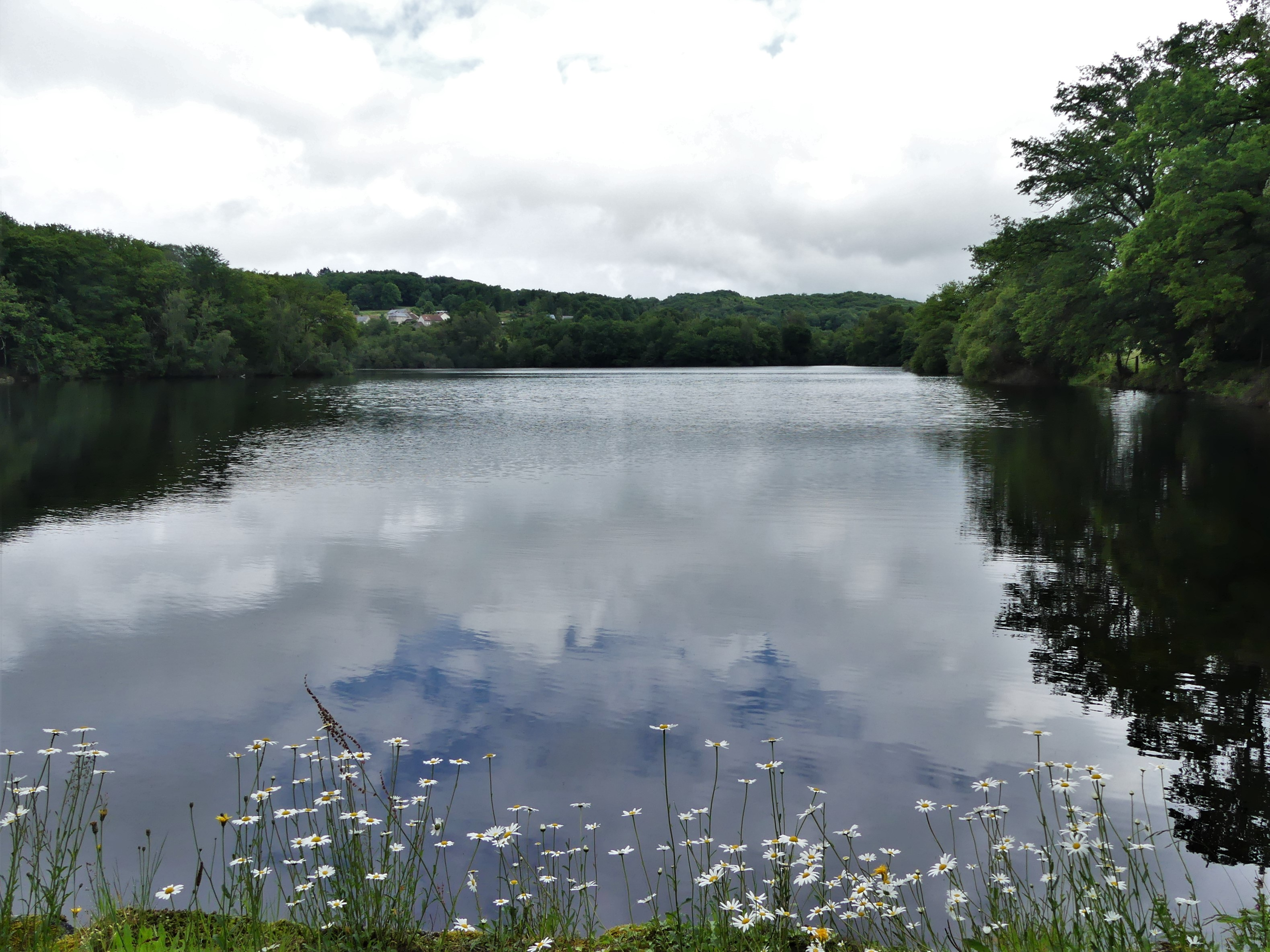 L'étang de Masmangeas, Sardent, Creuse, France.